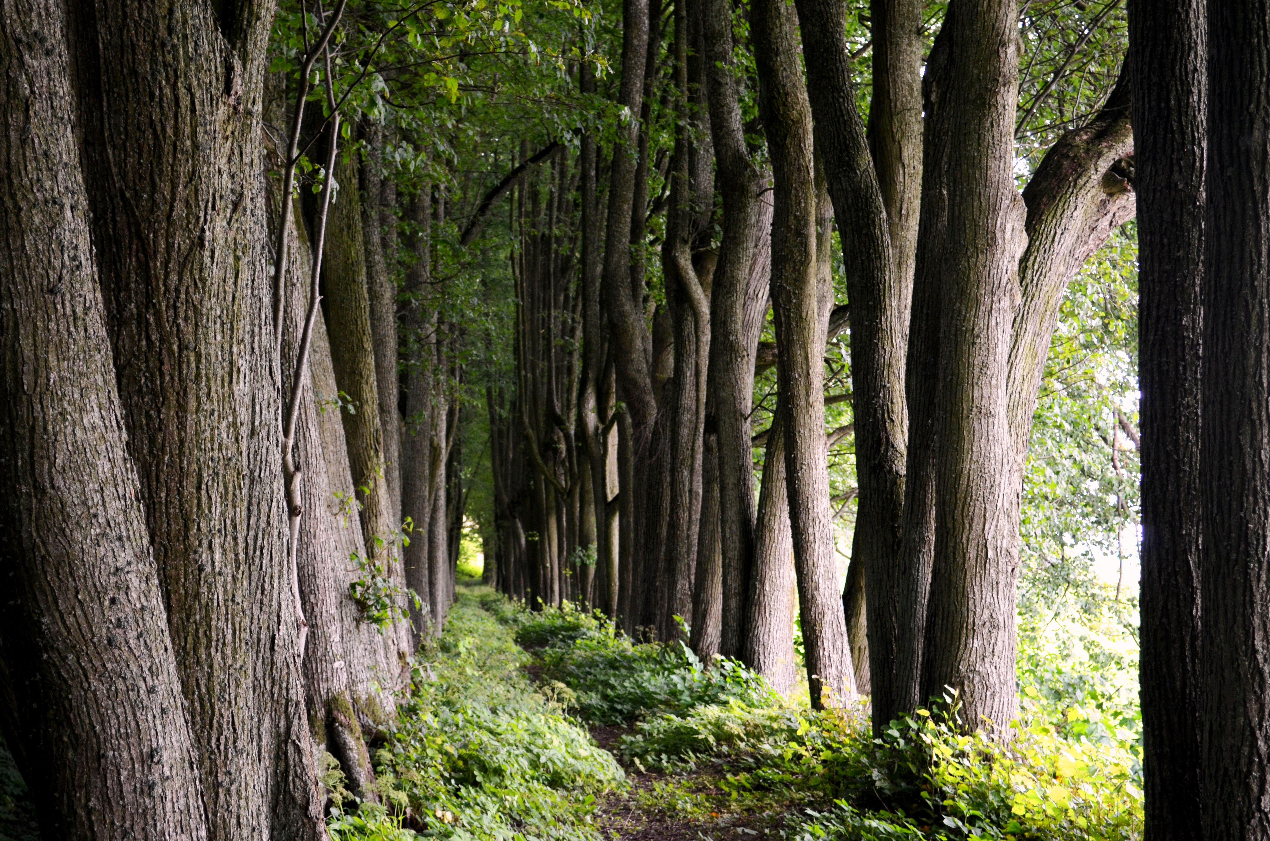 Daniliškio liepų alėja, Panevėžio raj.